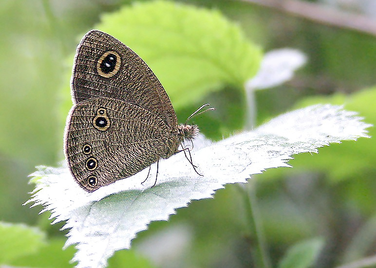 Himalayan Fivering Ypthima sakra taken in Kullu distt. of Himachal Pradesh, India during Saurkundi Pass Trek.